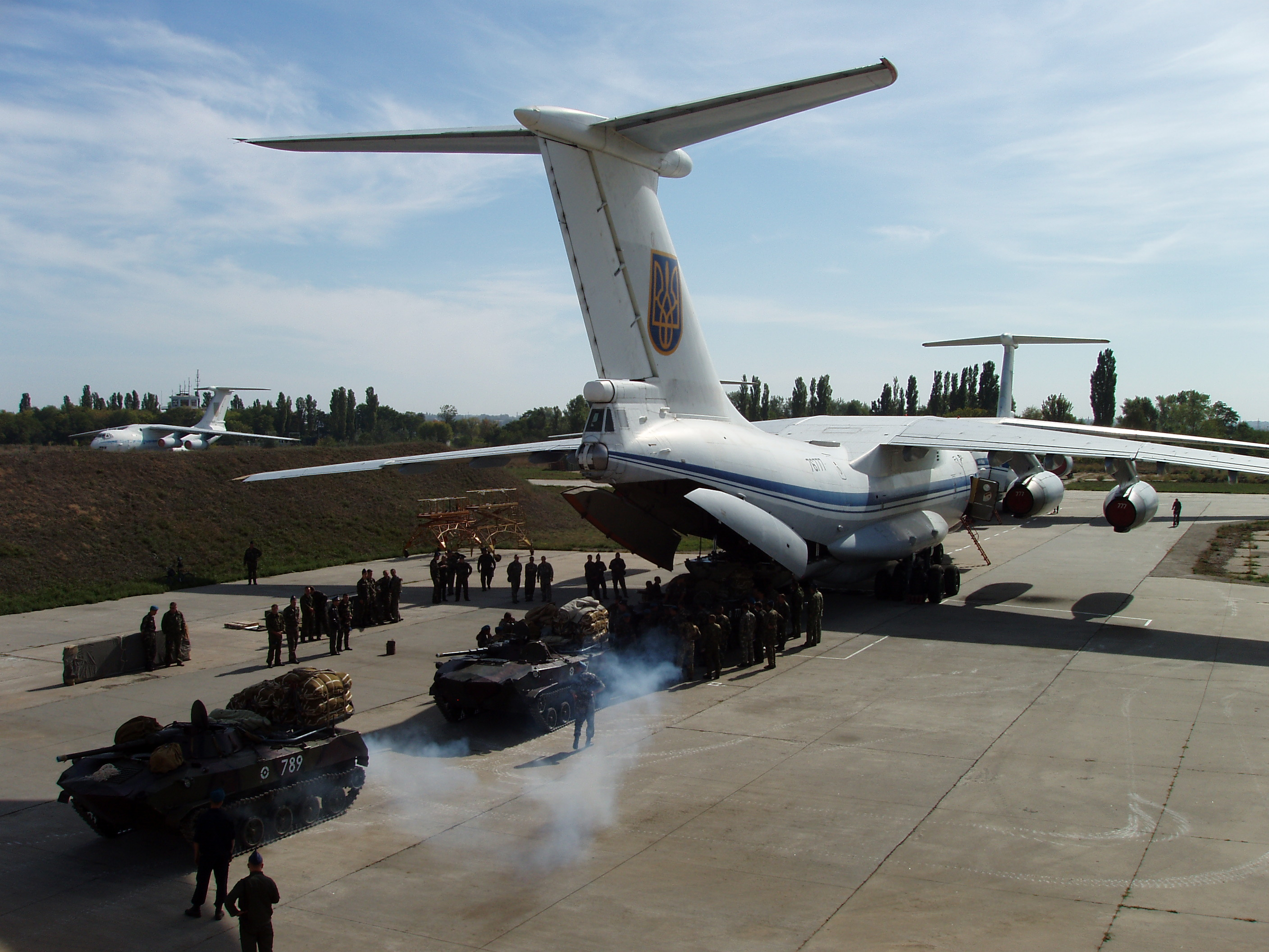 Використано матеріали зі статті в [Loading BMD-1 in IL-76, Ukraine англійській Вікіпедії]. Використано матеріали зі статті в [Загрузка БМД-1 в самолет Ил-76, Украина російській Вікіпедії]. укр. Завантаження 3-х БМД-1 зі складу 25-ої опдбр в літак Іл-76 на аеродромі Мелітополь, Україна